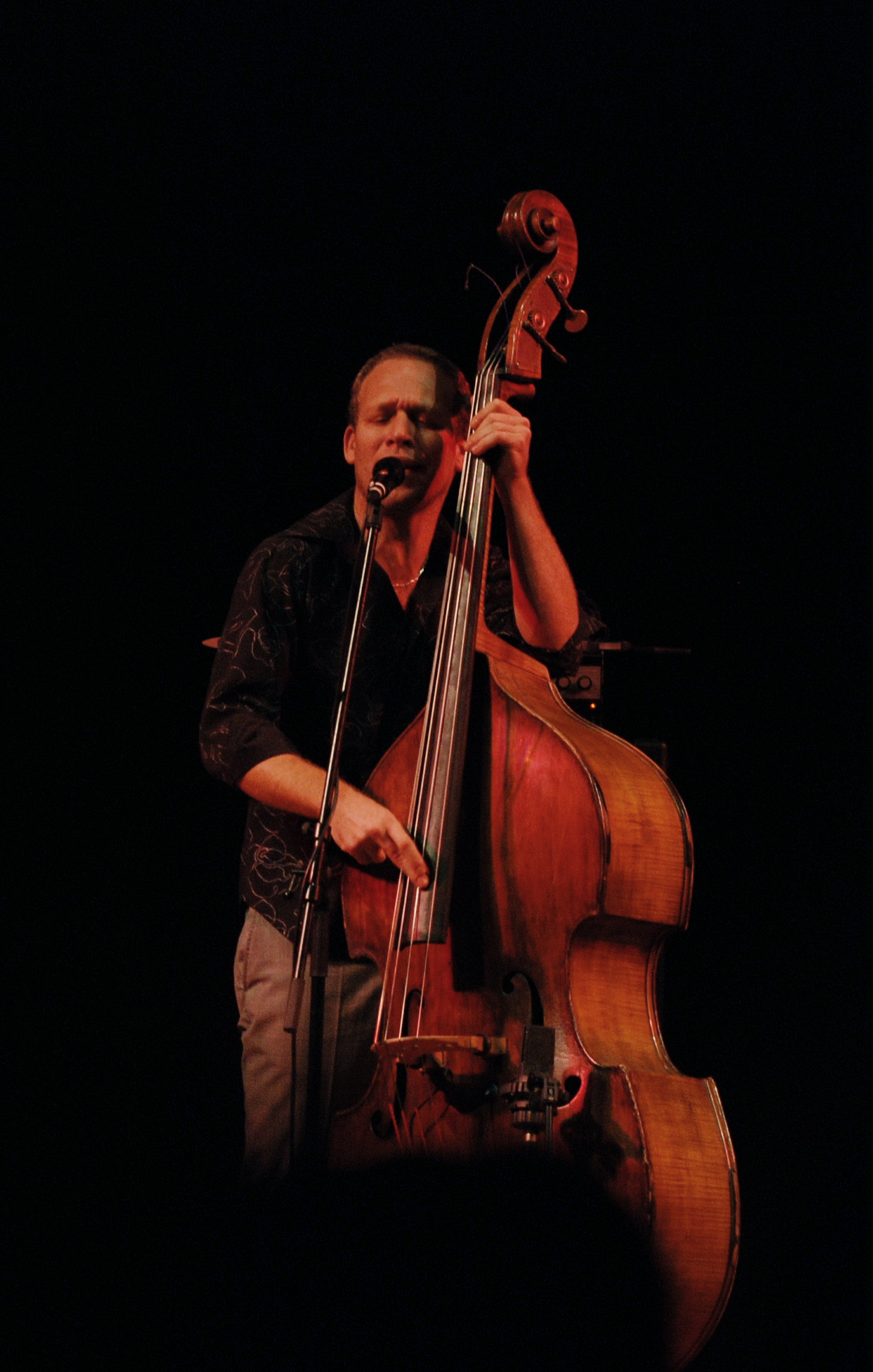 Avishai cohen live at the konzerthaus vienna on november 30, 2009.